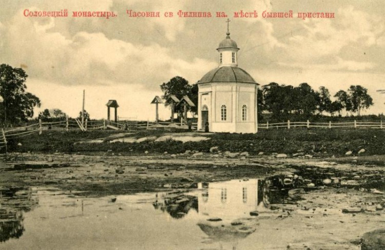 Соловецкий монастырь. Часовня св. Филиппа на месте бывшей пристани.